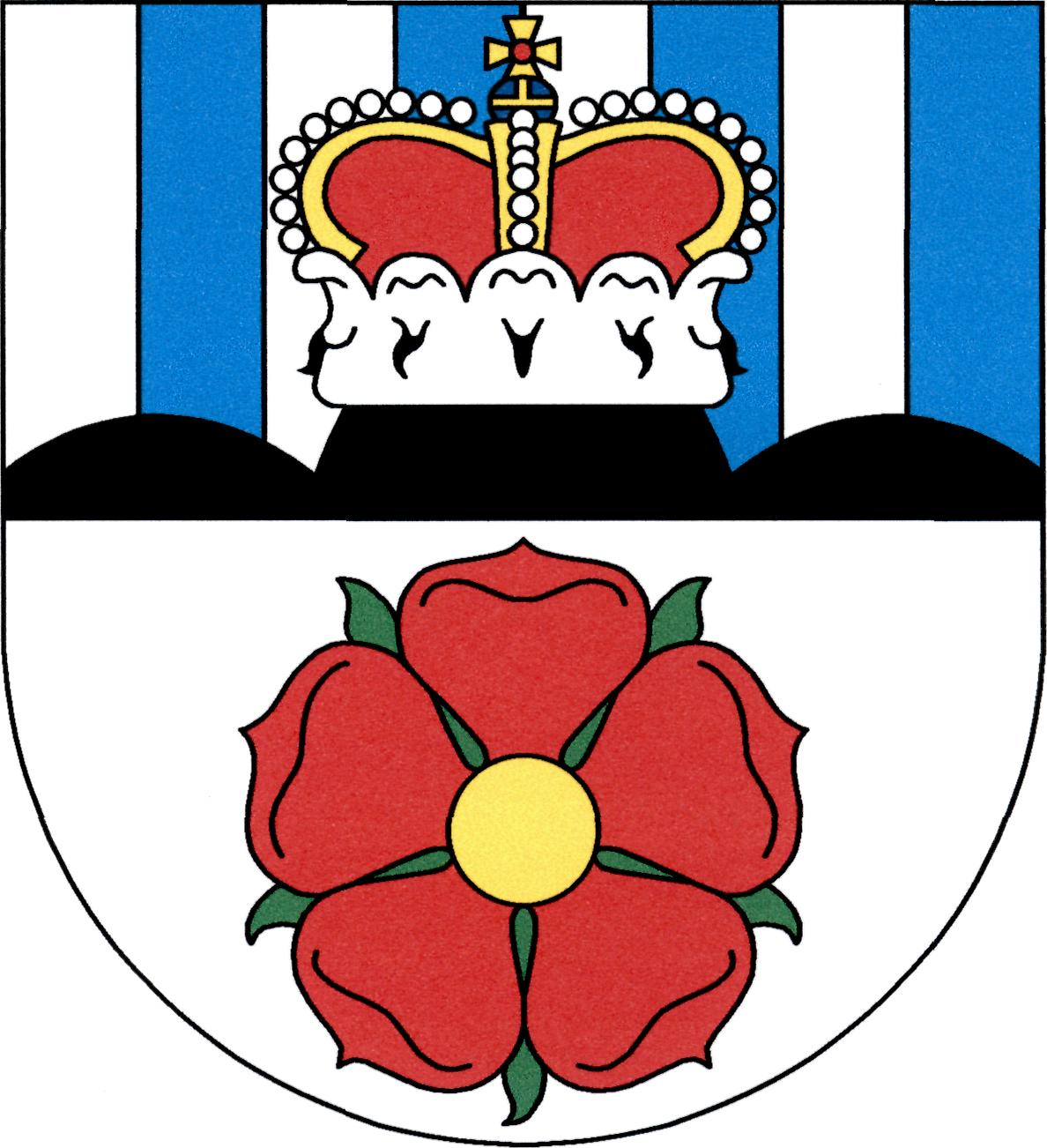 Znak obce Domanín (okres Jindřichův Hradec)